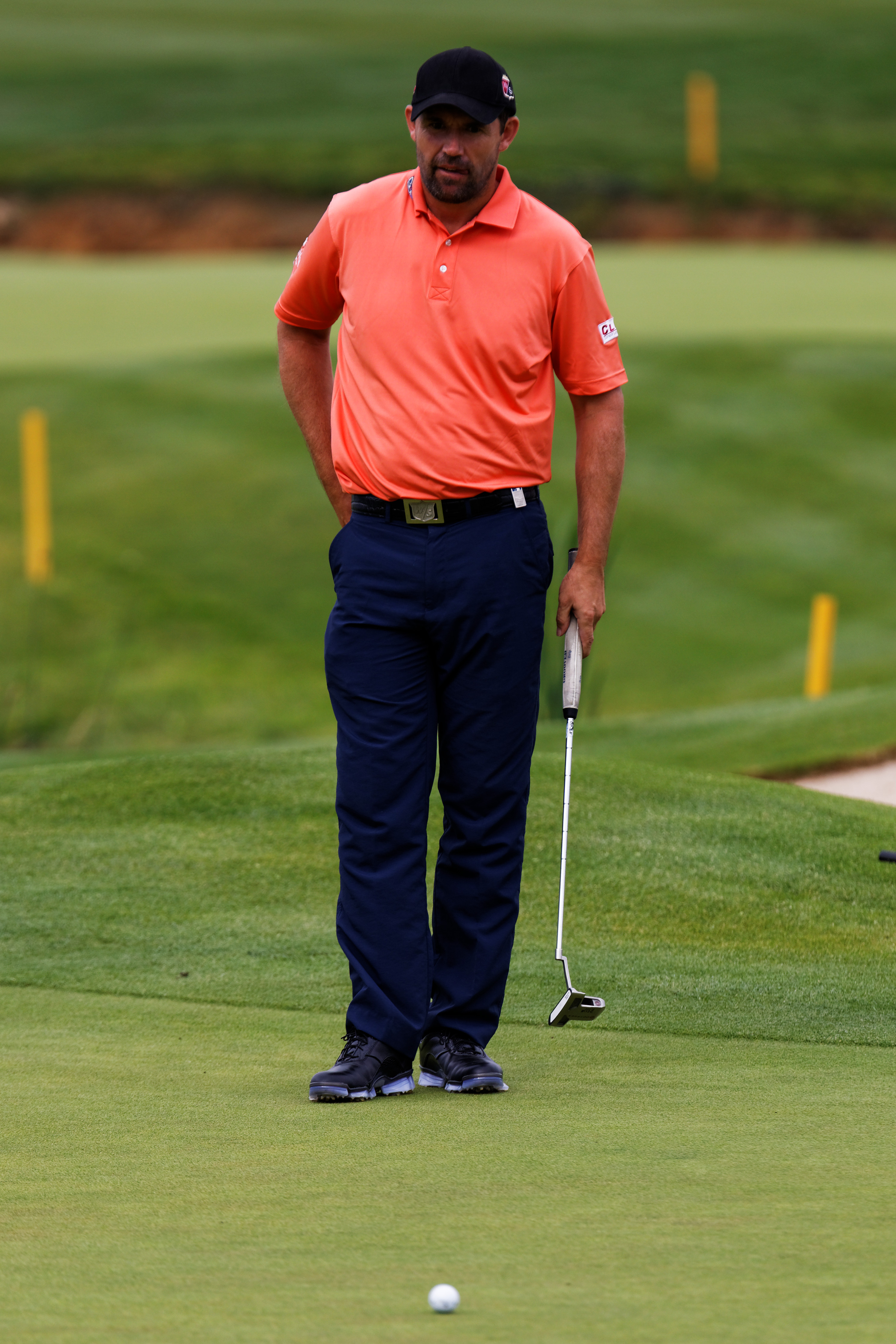 Padraig Harrington lors de l'Open de France de golf 2014, sur le green du 18, Golf de St Quentin en Yvelines